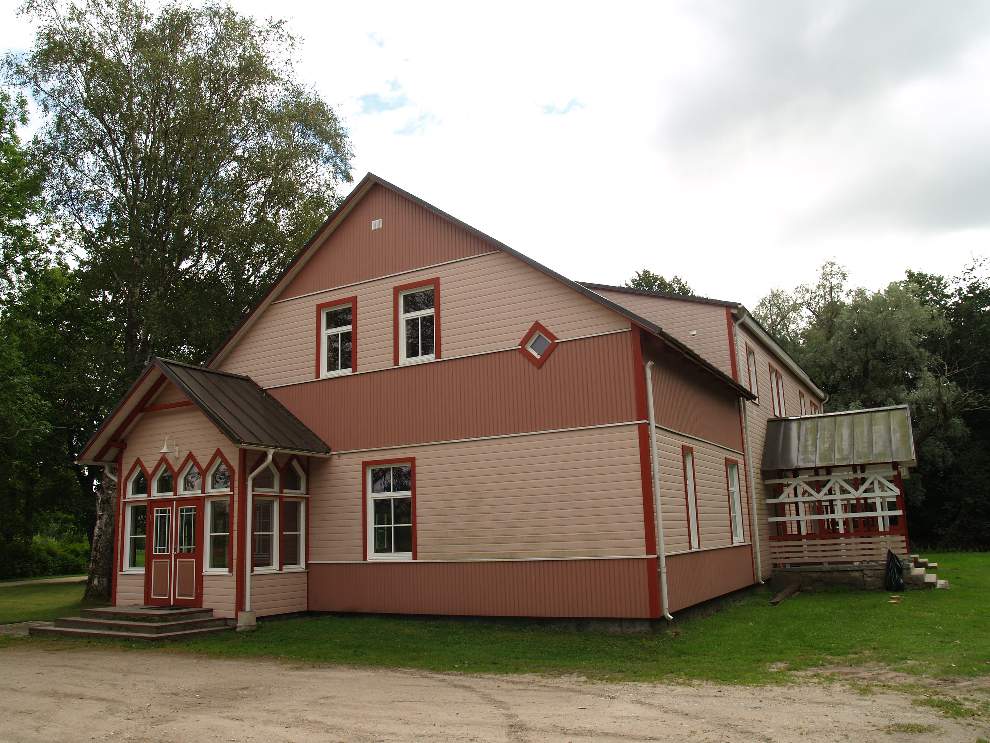 Häädemeeste Seltsimaja